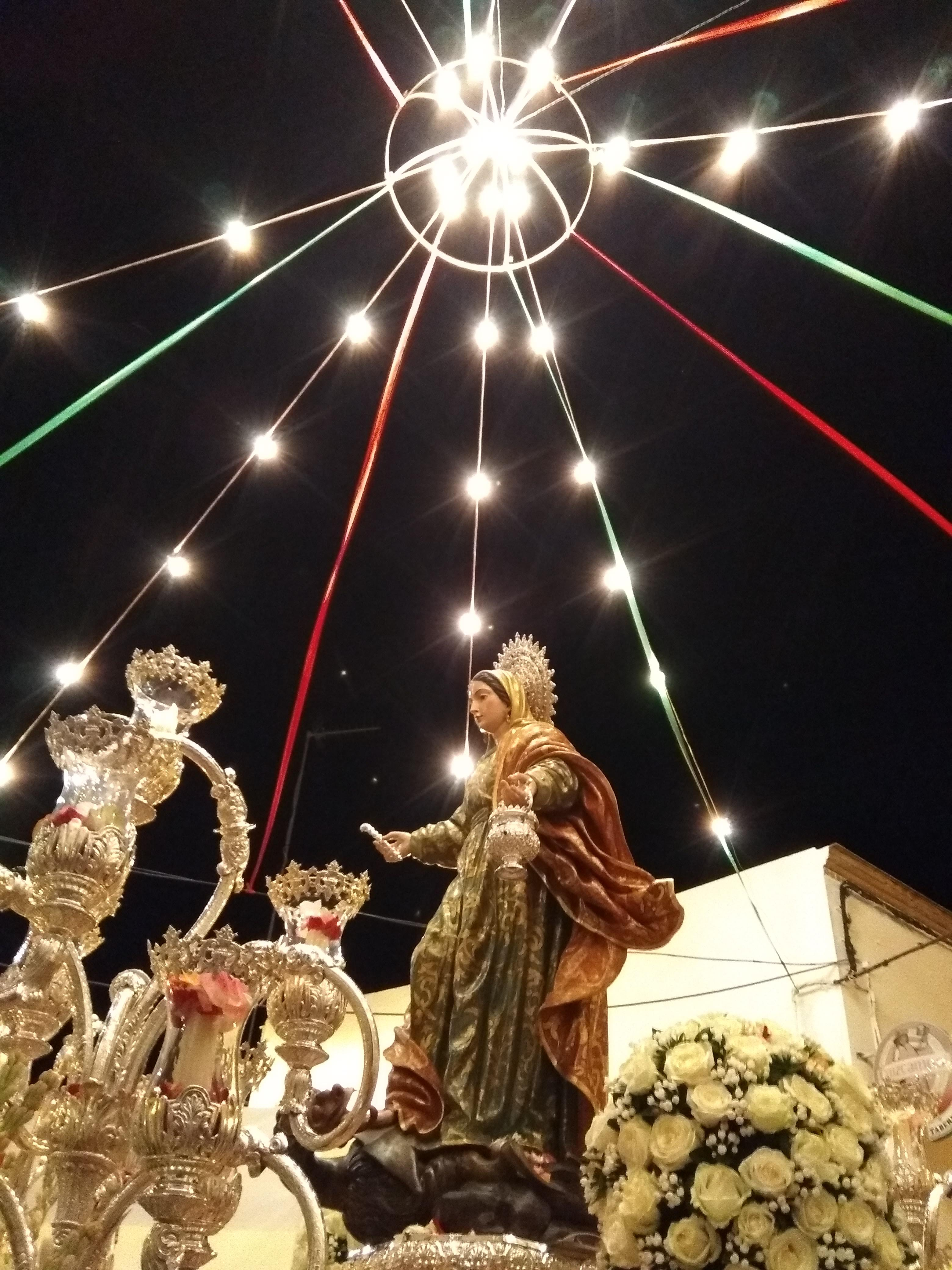 santamartabrillante.png